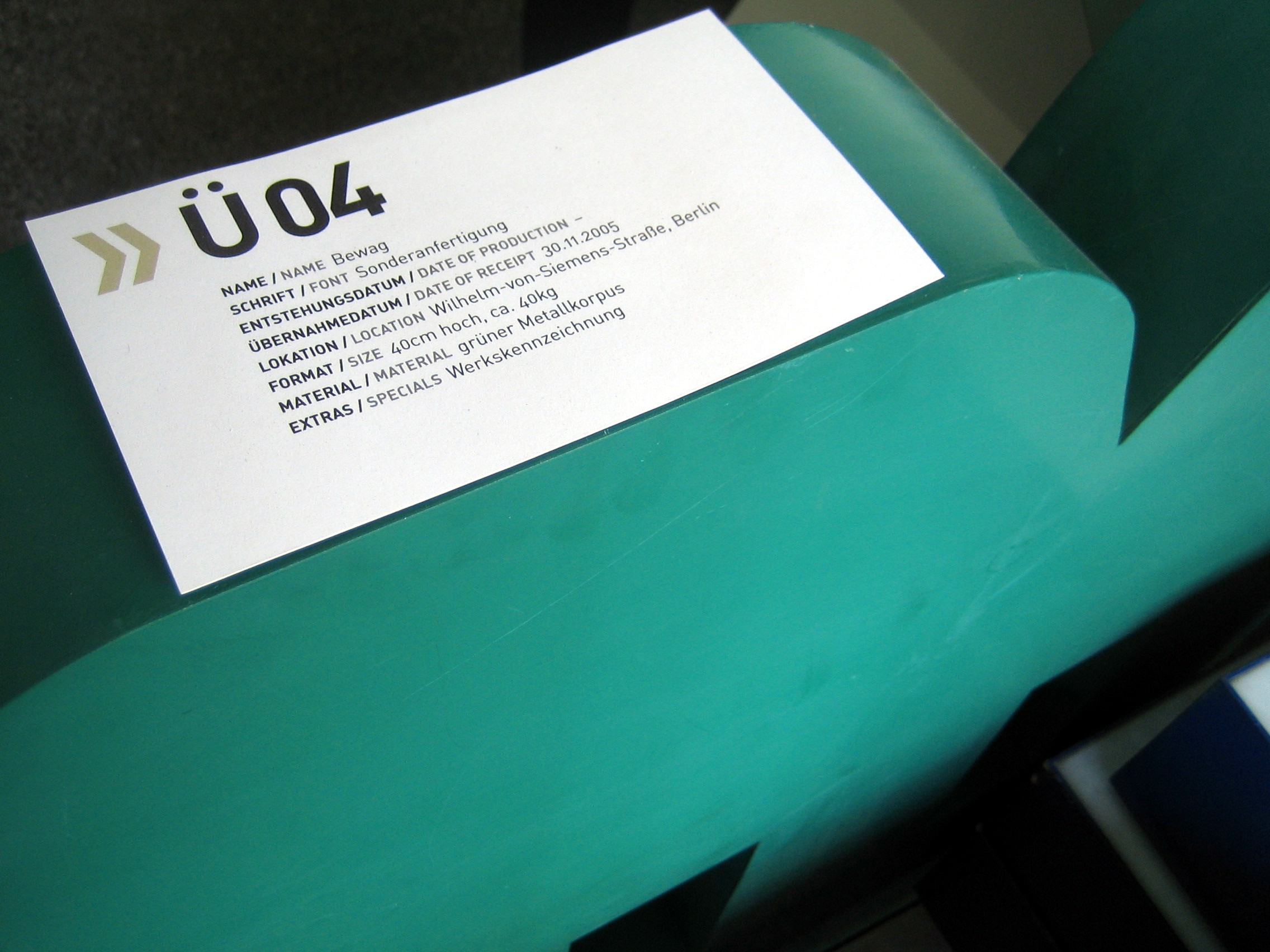 Buchstabenmuseum Berlin, ein Projekt zur "Bewahrung und Dokumentation Von Buchstaben und Zeichen", hauptsächlich von dreidimensionalen Objekten aus dem öffentlichen Raum (Gebäudebeschriftungen usw.). Basisinformationen auf einem Buchstaben im so genannten Schaudepot.